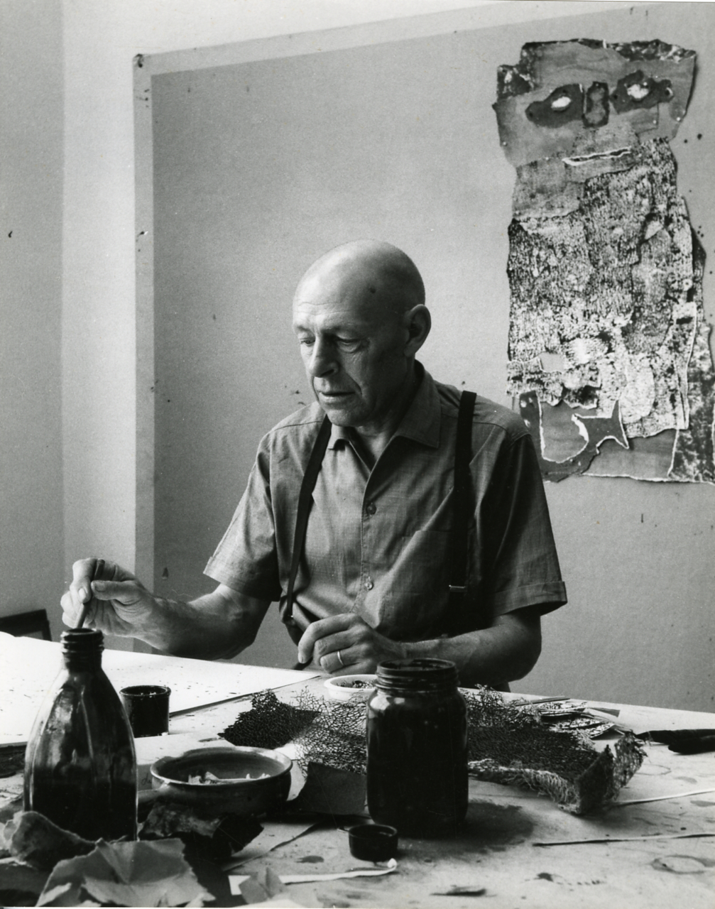 Servizio fotografico : Italia, 1960 / Paolo Monti. - Stampe: 3 : Positivo b/n, gelatina bromuro d'argento/ carta, 24x30. - ((Al verso delle stampe manoscritto: "Jean Dubuffet". Sul coperchio della scatola manoscritto: "Ritratti Artisti".